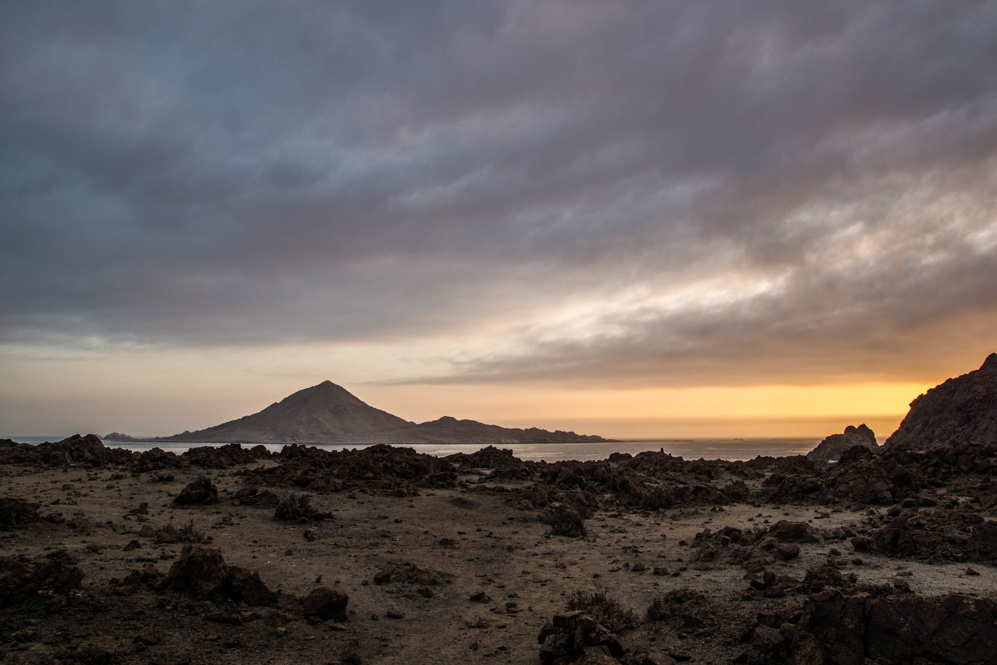 Atardecer con vista a la isla Pan de Azúcar